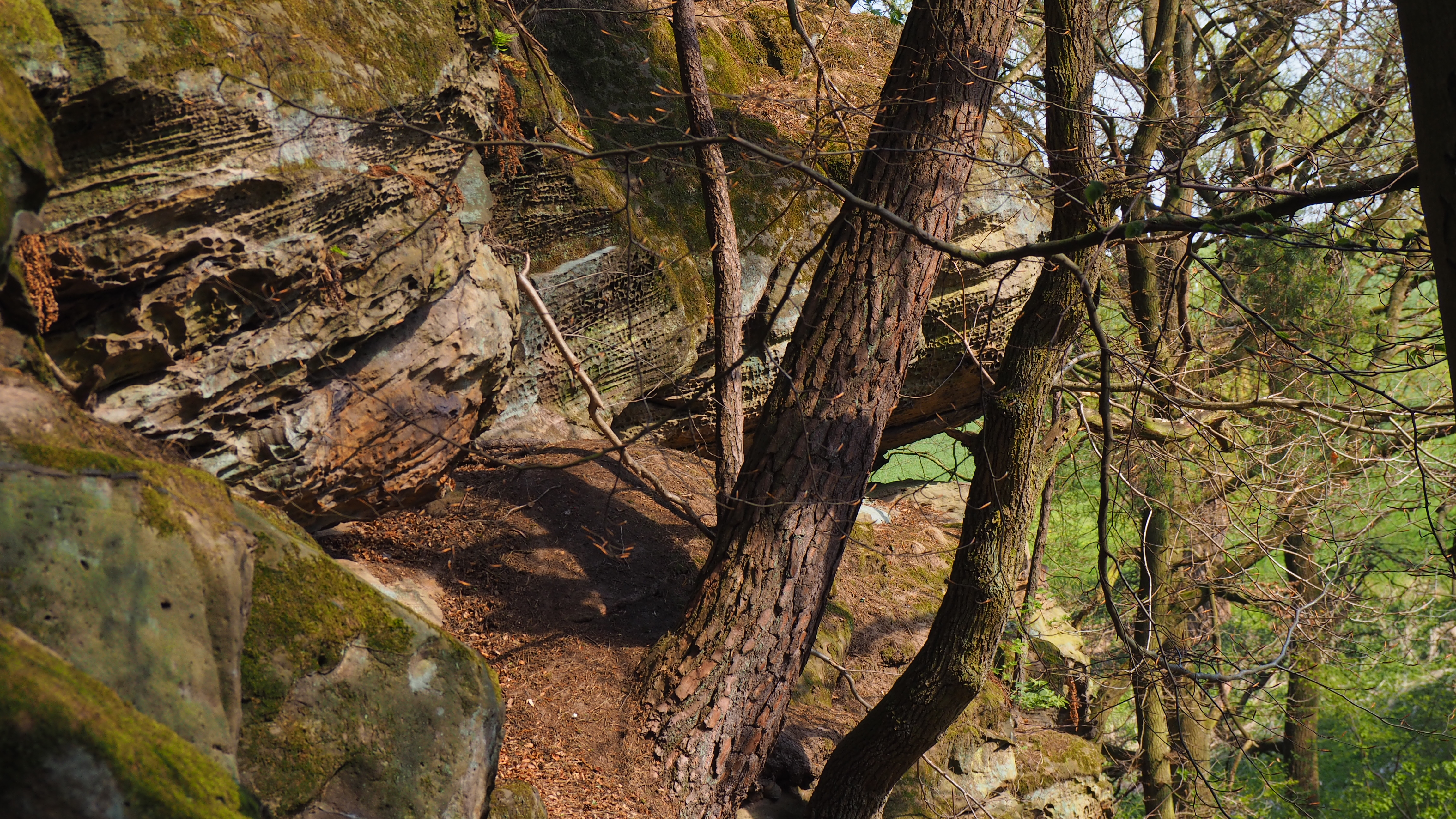 Hollenkammer bei Lütersheim, Naturdenkmal in Volkmarsen